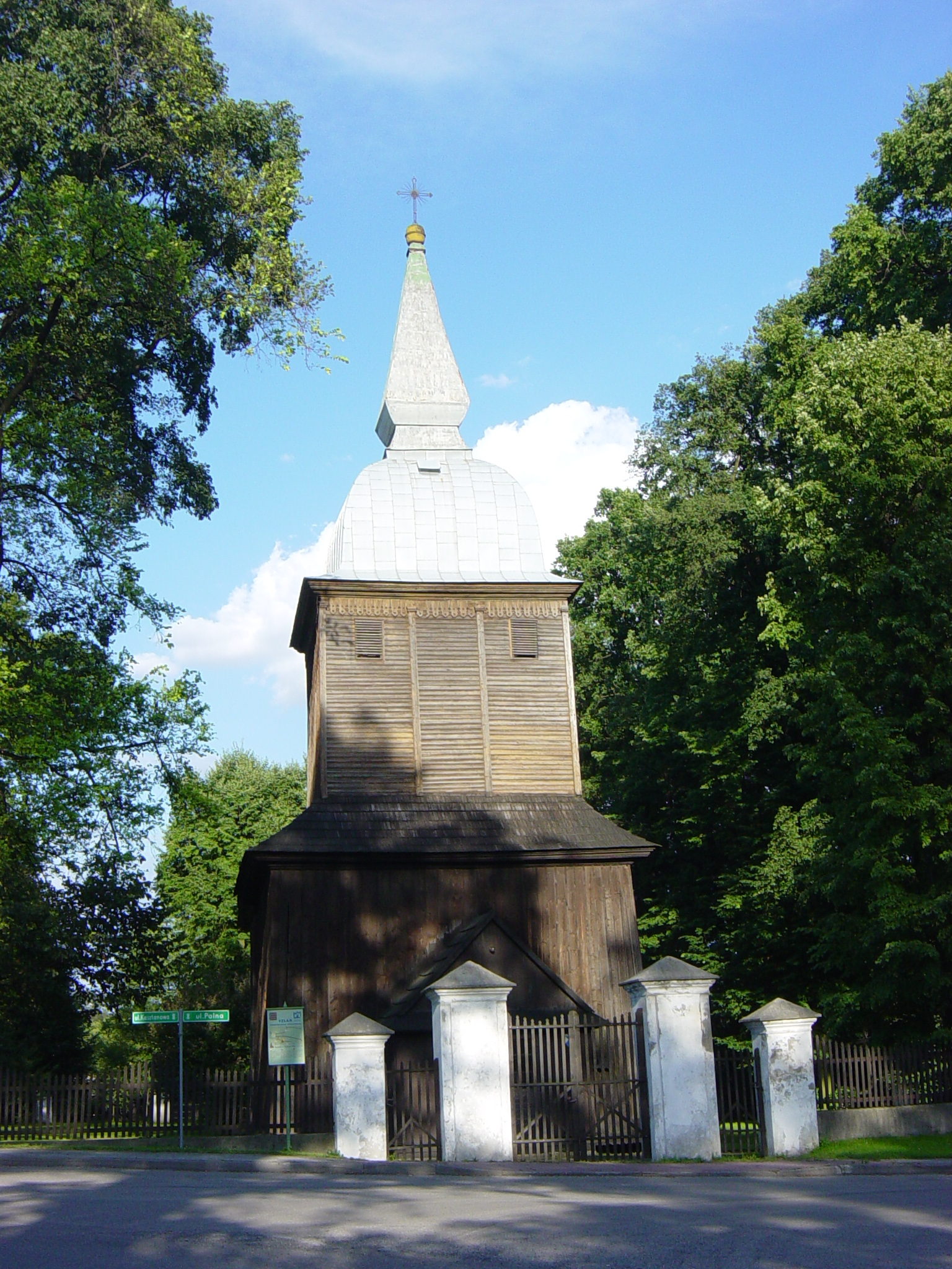 Kościół pw. Św. Mikołaja z XVI w w Polance Wielkiej